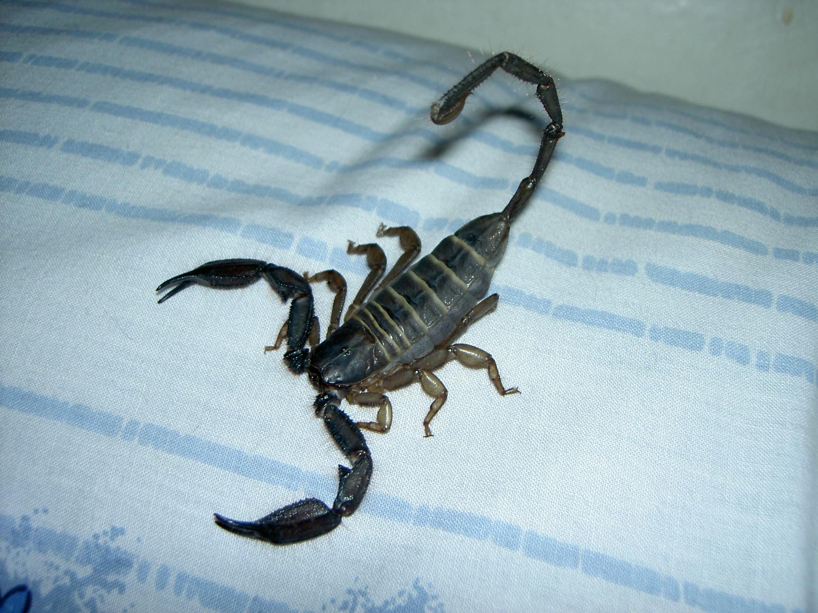 Hadogenes paucidens